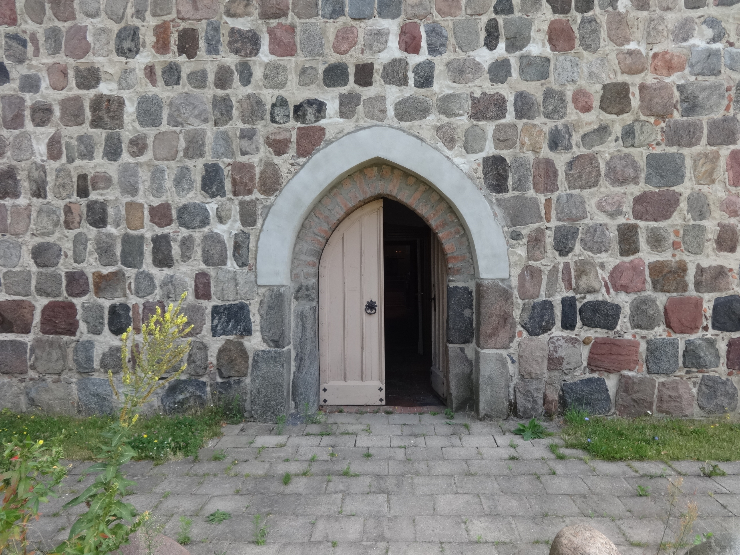 Die Dorfkirche in Dahlewitz ist eine Feldsteinkirche aus dem 13. Jahrhundert, die im 17. Jahrhundert barock überformt wurde. Im Innern befindet sich eine Ausstattung, die im Wesentlichen aus dem Jahr 1861 stammt.